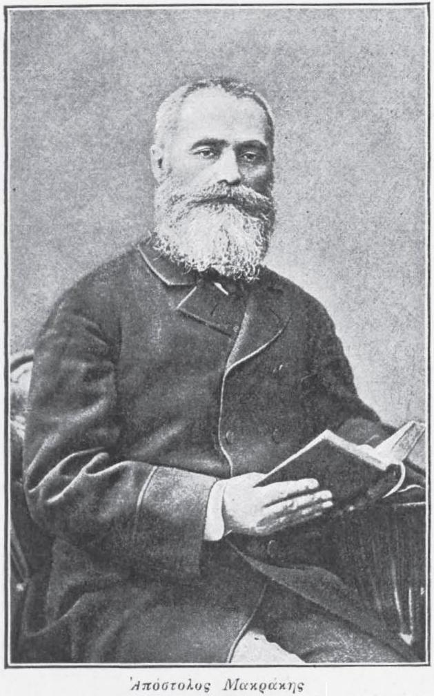 griechischer Regierungspolitiker, 1896